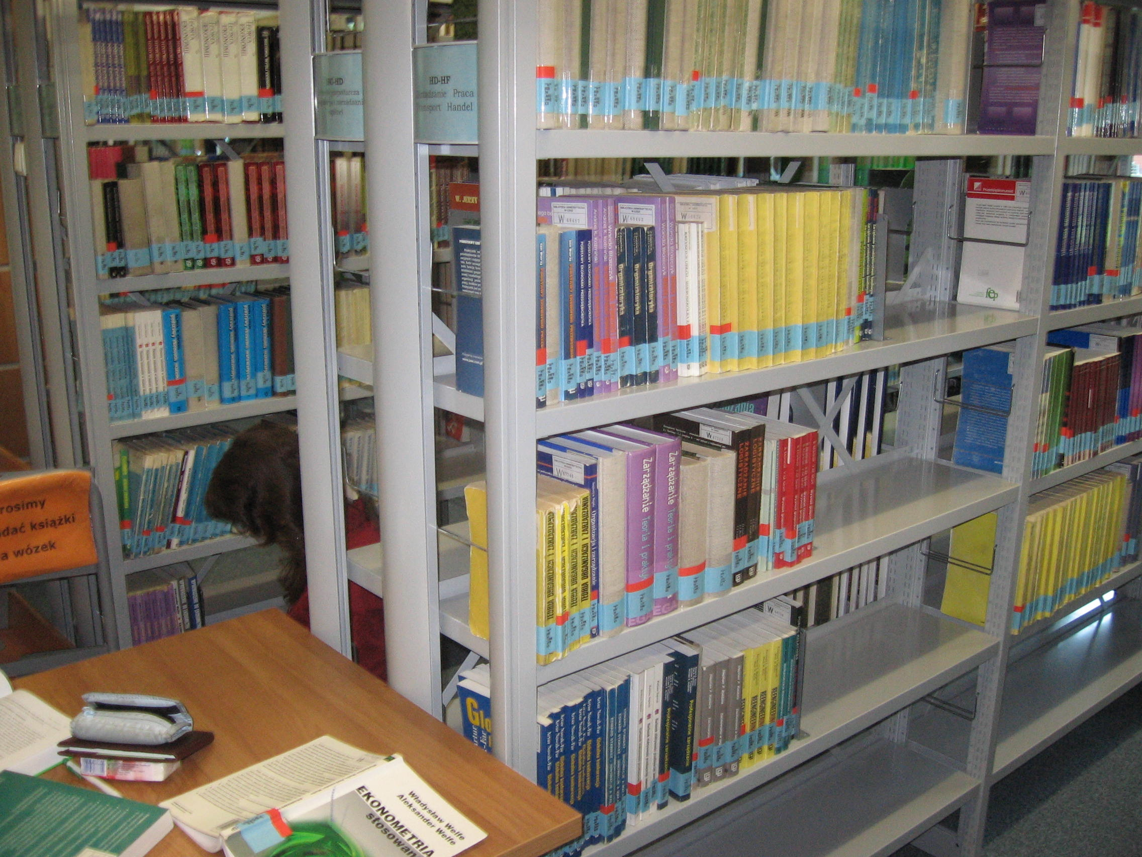 Biblioteka Uniwersytetu Łódzkiego